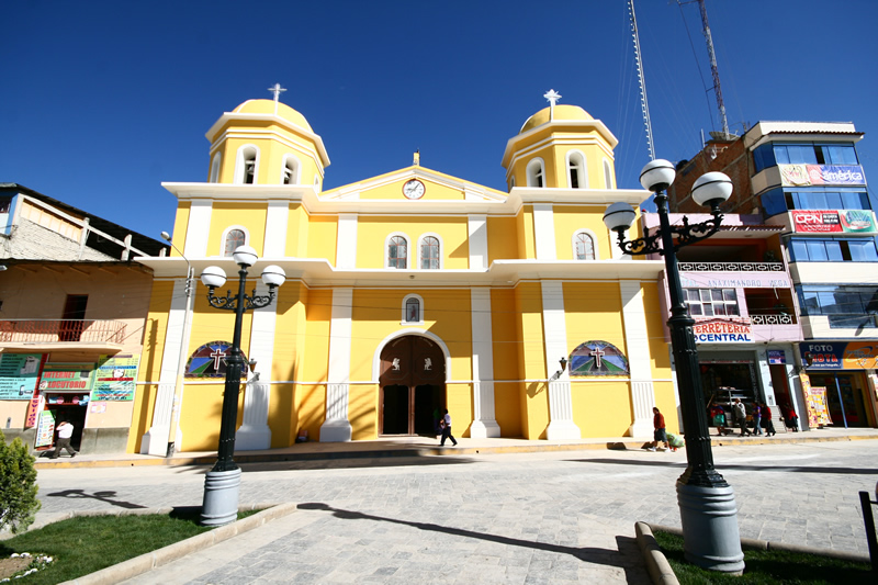 Construcción hecha de adobe, terminada hacia el año 1912. Es la sede de la Prelatura de Chota